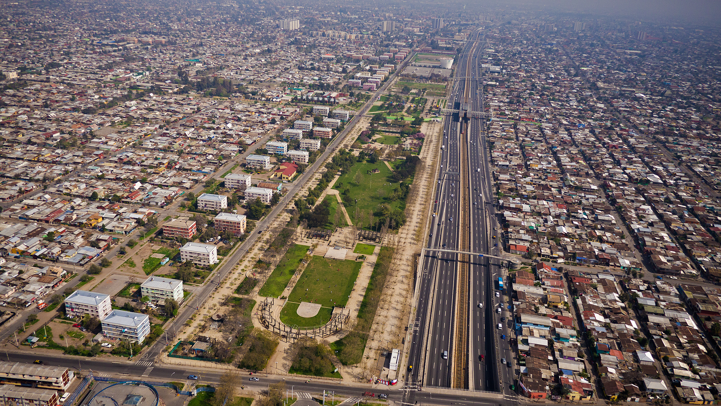 Parque La Bandera, Santiago de Chile.